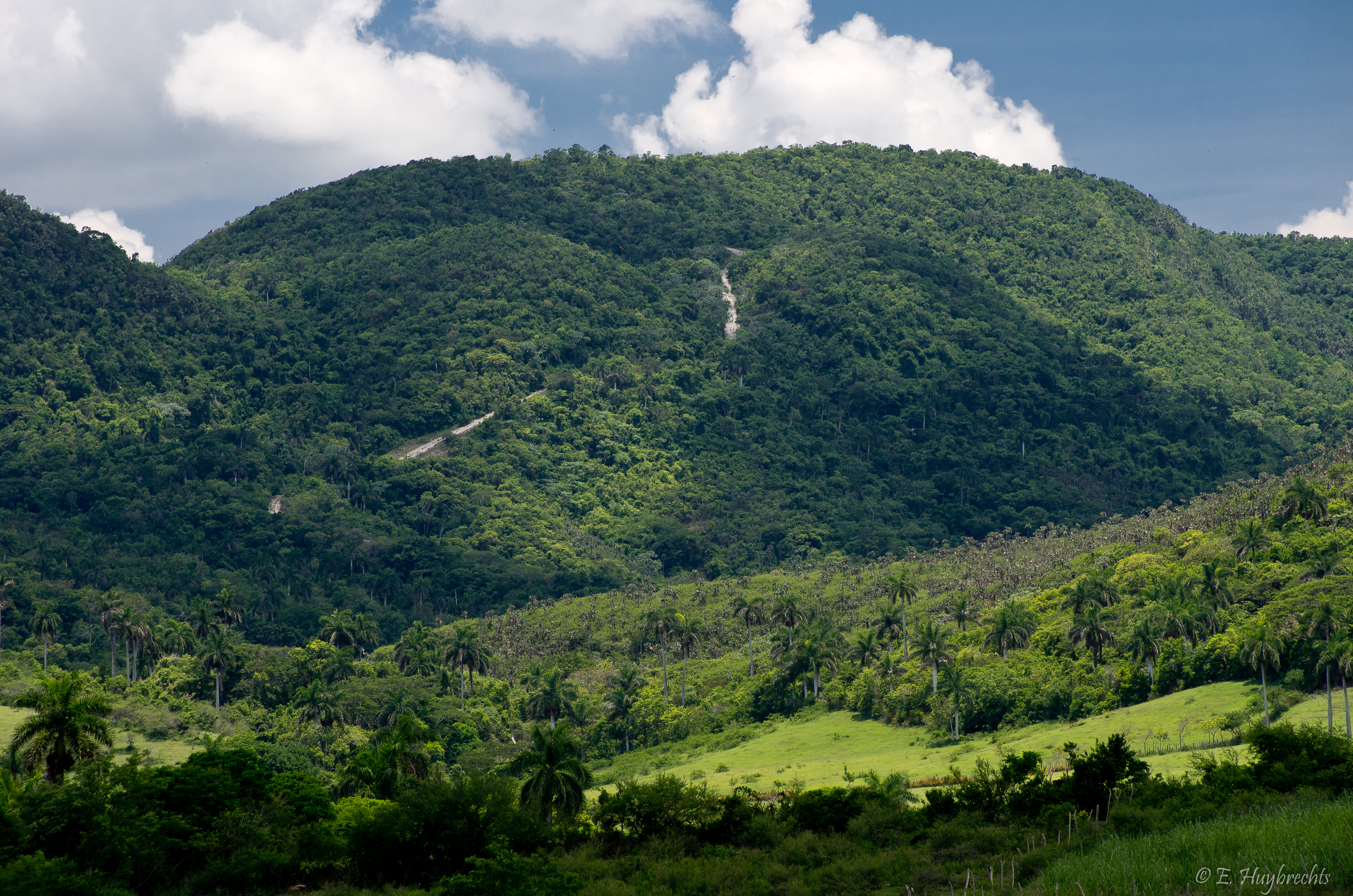 Yumuri Valley